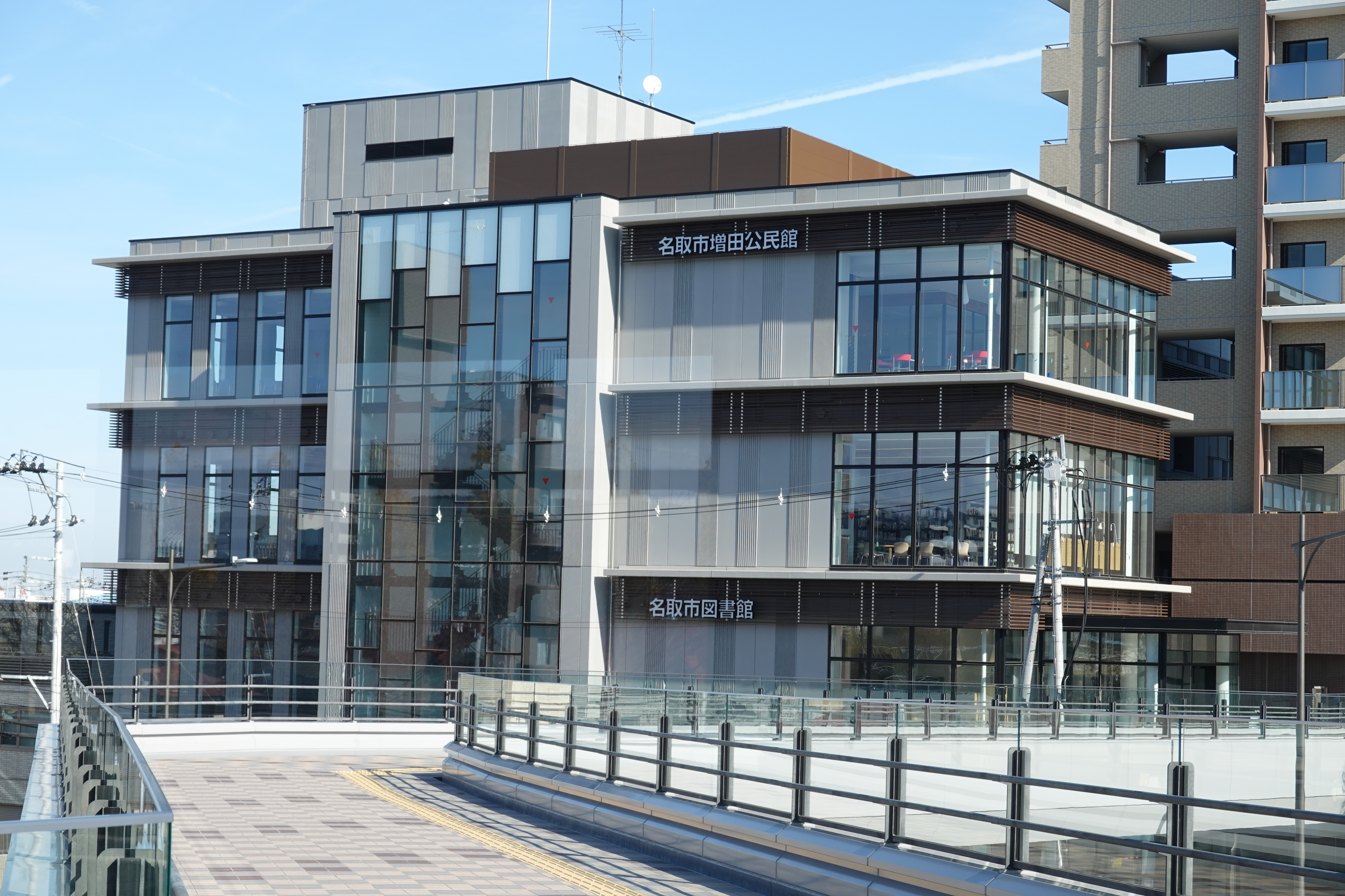 2018年12月19日にオープンした新名取市図書館（撮影は2018年11月）